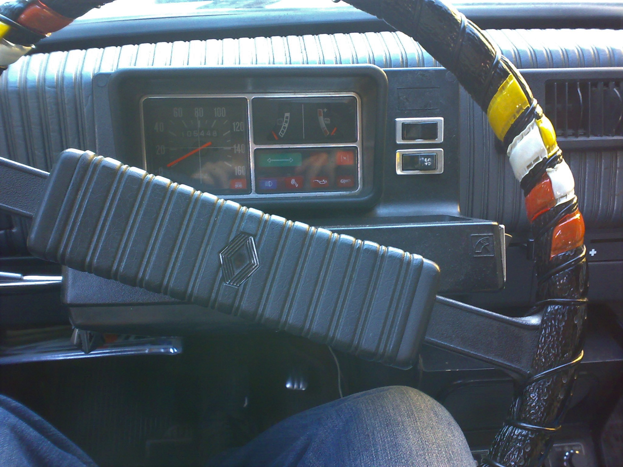 Cuadro de mandos del Renault 5 TL de 1978.